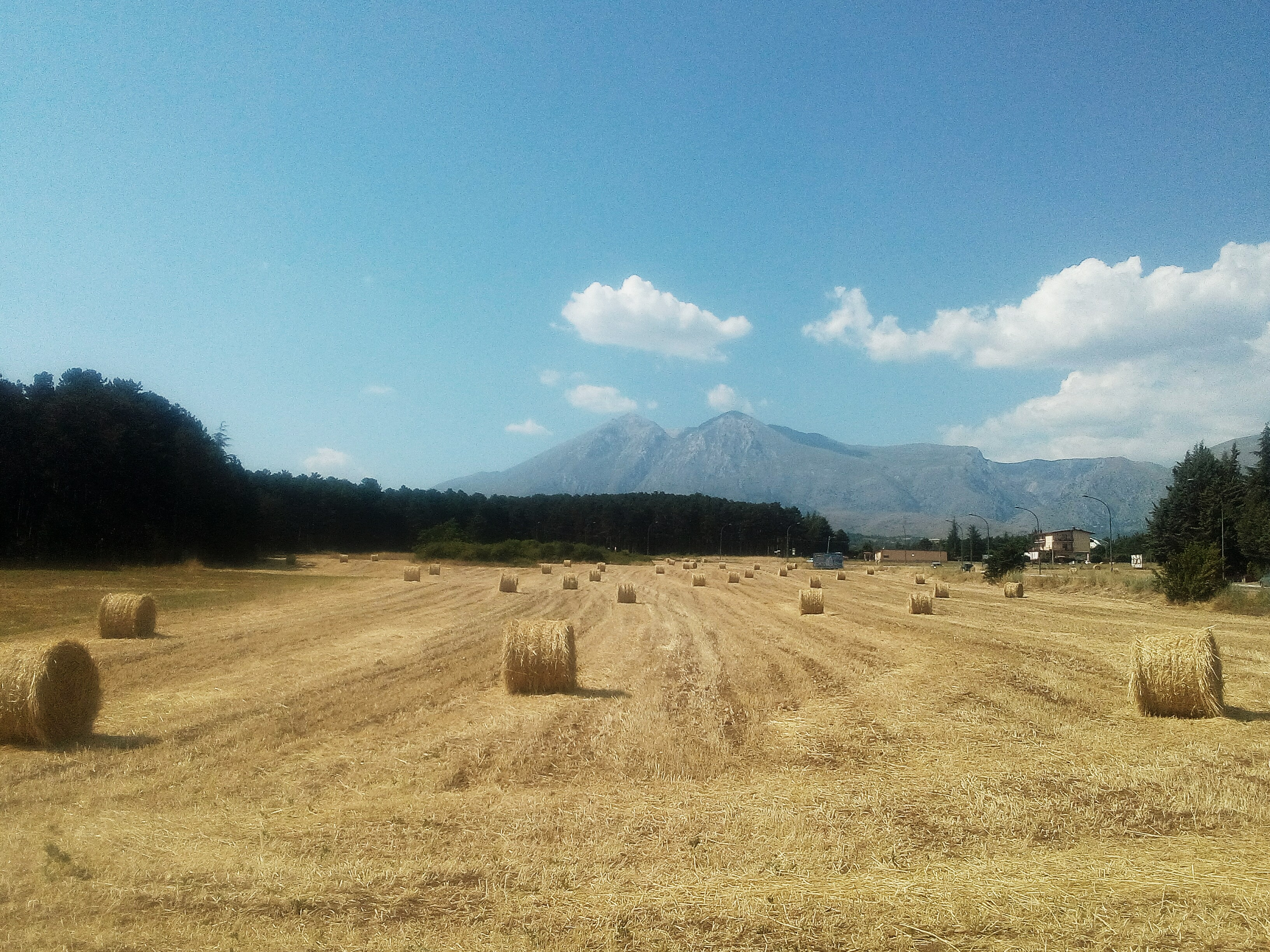 Monte Velino, Avezzano, Abruzzo